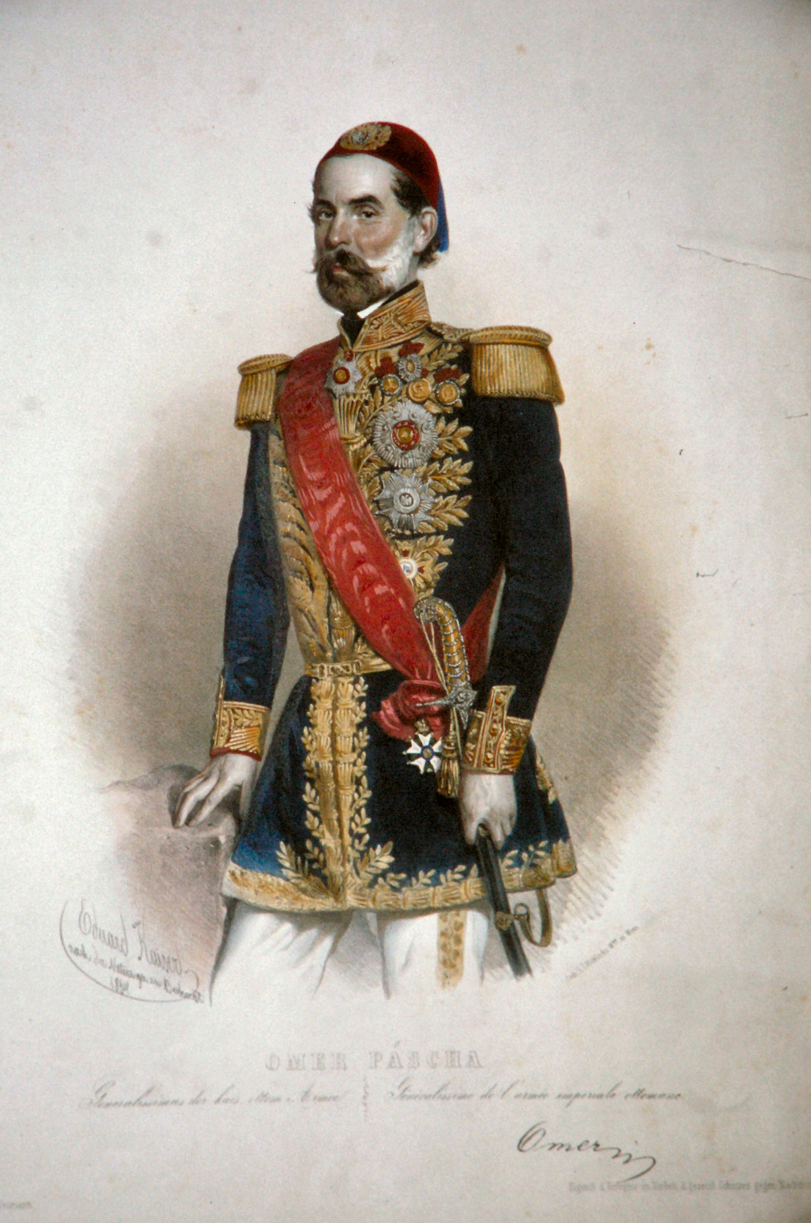 Omar Pascha, eigentlich Michael Latas (1806-1871), osmanischer General. Lithographie von Eduard Kaiser, 1854